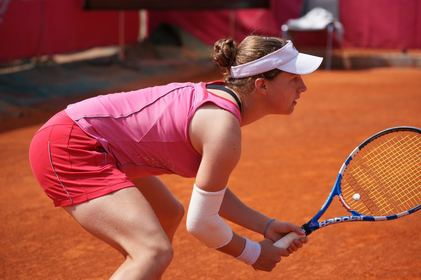 Karen BARBAT, Open tennis, Cagnes, 2011